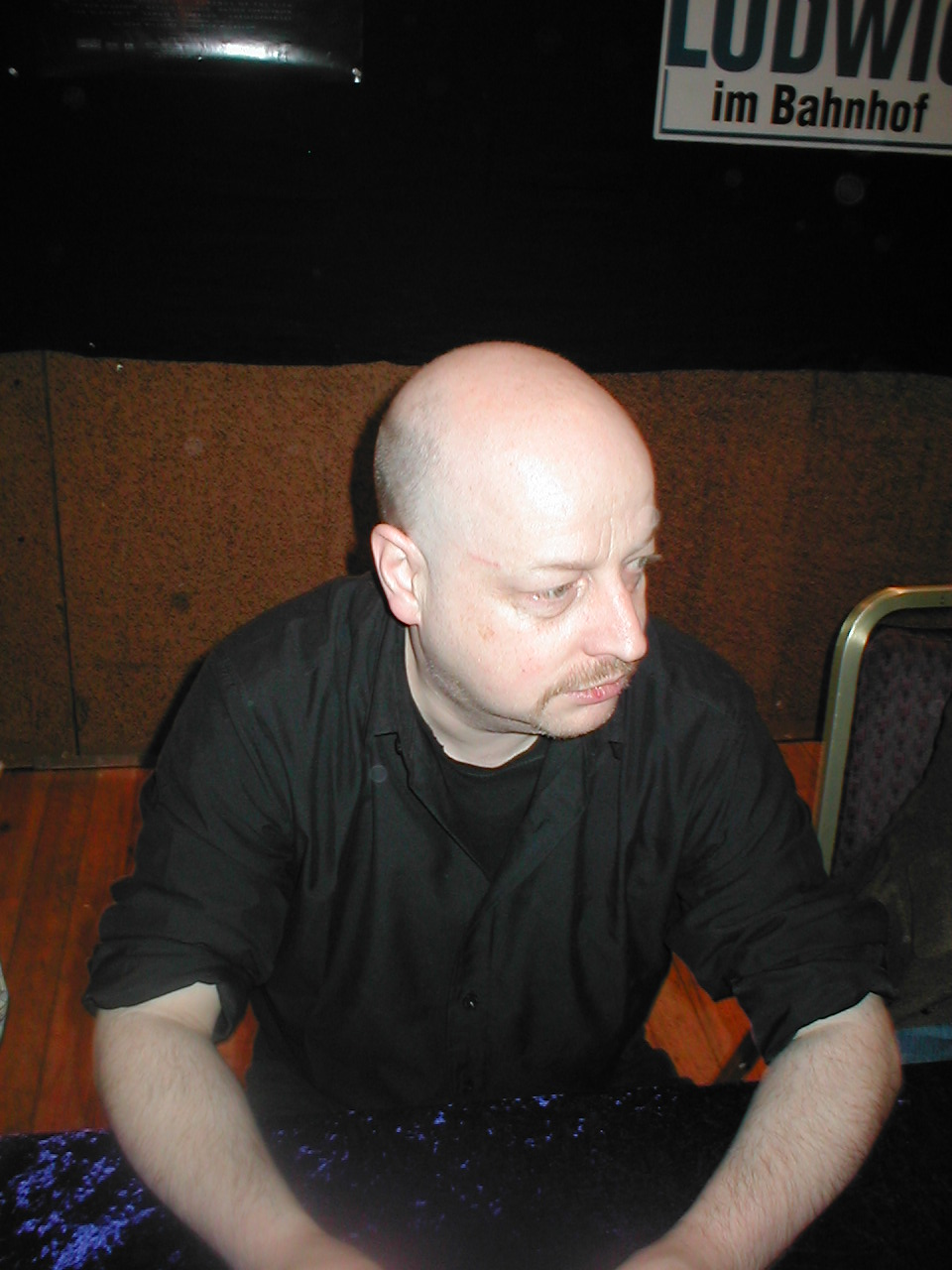 Achim Mehnert, Science-Fiction-Autor